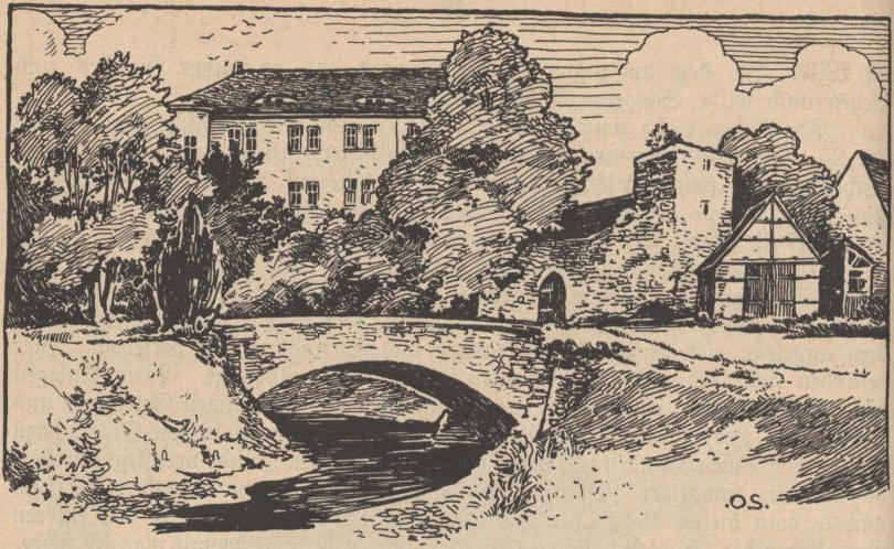 Beiträge zur Sächs. Volks- und Heimatkunde. Mit Zeichnungen von Professor O. Seyffert und Maler F. Rowland.